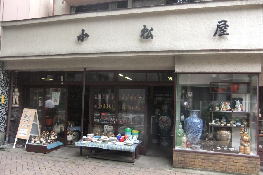 前橋市千代田町の小松屋陶器店の外観です、２０１７年に国道１７号から撮影されました。